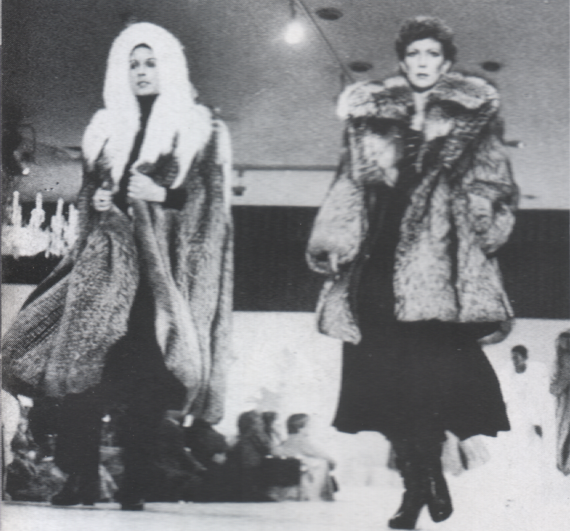 Pelzmodenschau zur Frankfurter Nachmusterung 1978 im Ballsaal des Hotels Frankfurt Intercontinental, Frankfurt am Main. Inszenierung Team Fashion Lights, Helmut Lang, Berlin.